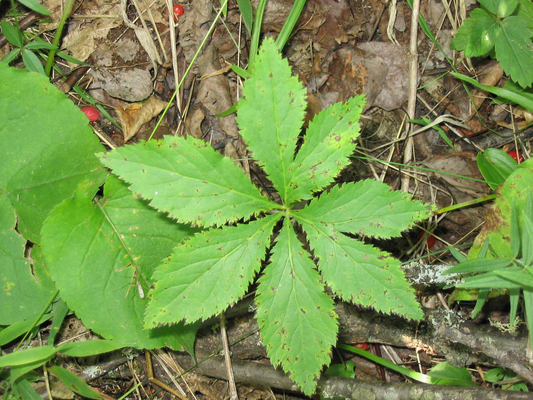 Sanicula_marilandica_1-eheep